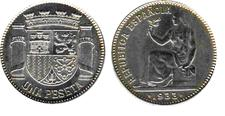 Moneda de 1 peseta de la II República Española